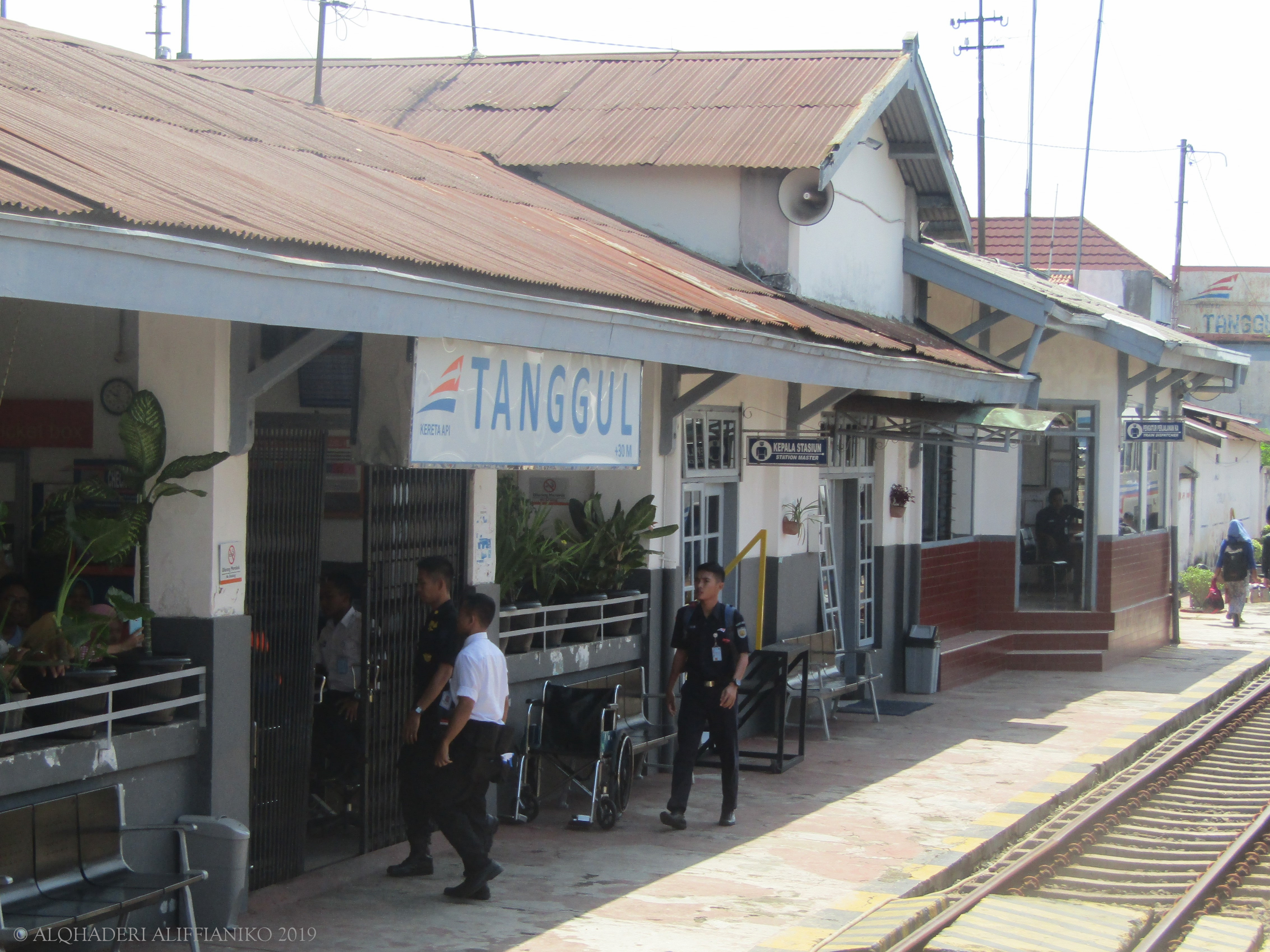 Stasiun Tanggul, dipotret dari peron